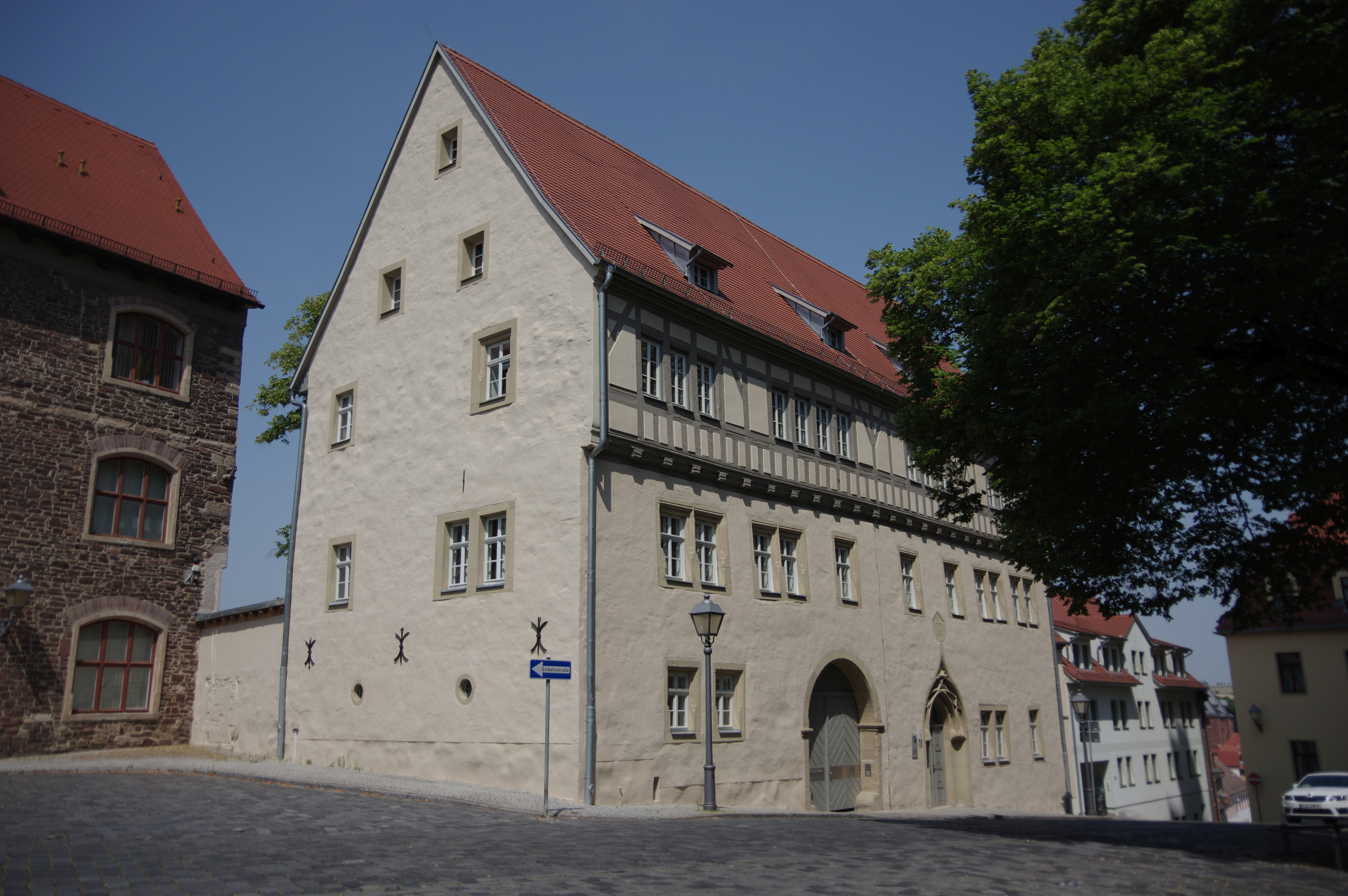 Lutherstadt Eislleben. Das Haus am Andreaskirchplatz (Nummer im Namen der Datei) steht unter Denkmalschutz.